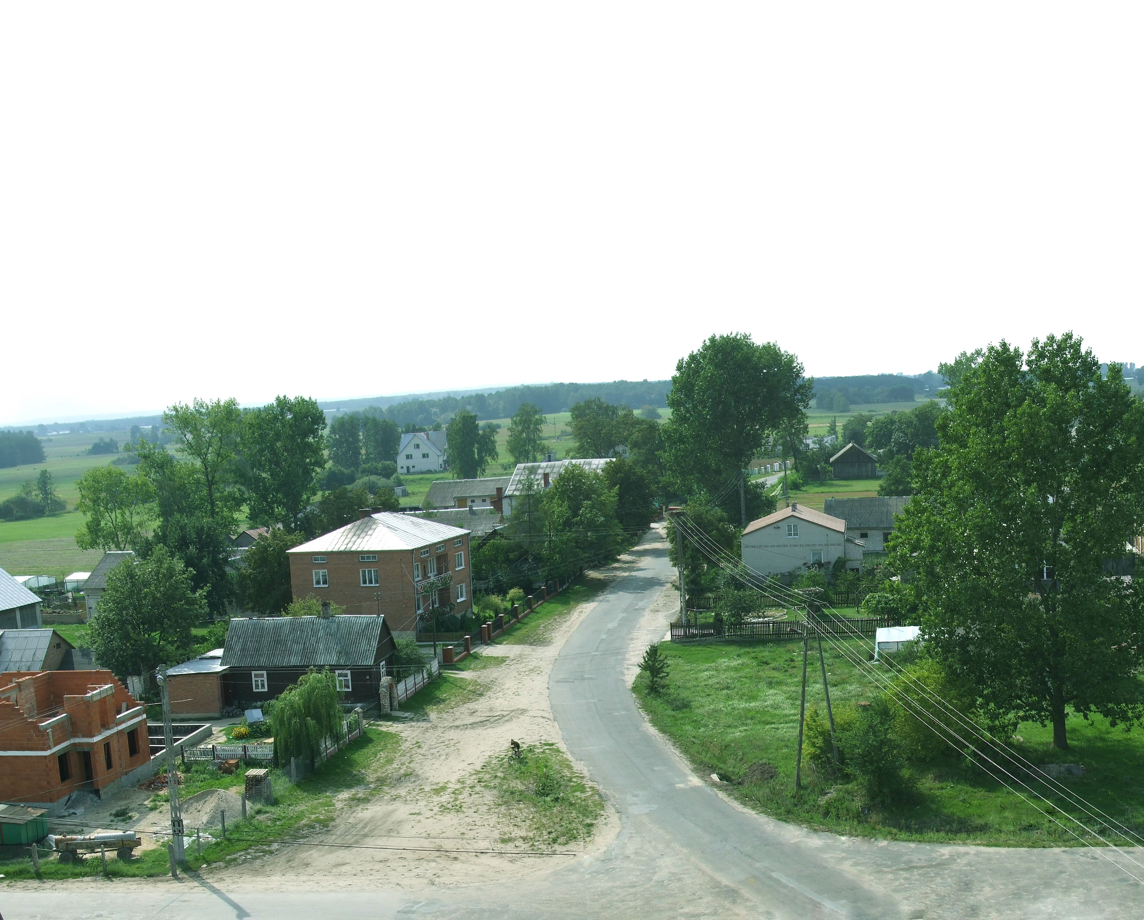 Widok z wierzy kościoła pod wezwaniem św. Wawrzyńca we wrzosie.